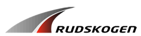 Ny logo for Rudskogen Motorsenter fra 2012